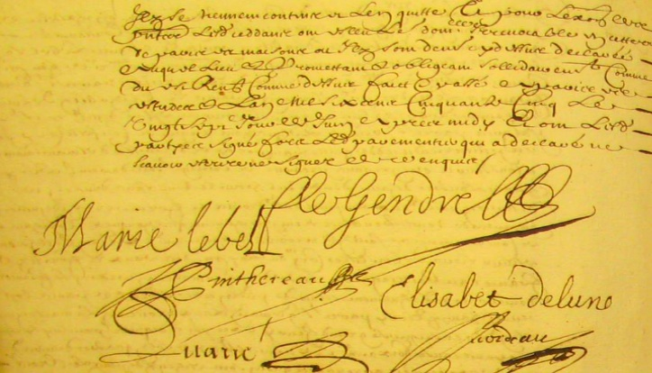 Signature de François Legendre, arithméticien parisien.